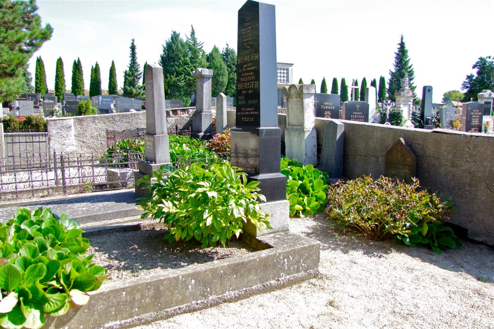 Friedhof israelitisch, in Bad Pirawarth, Niederösterreich.